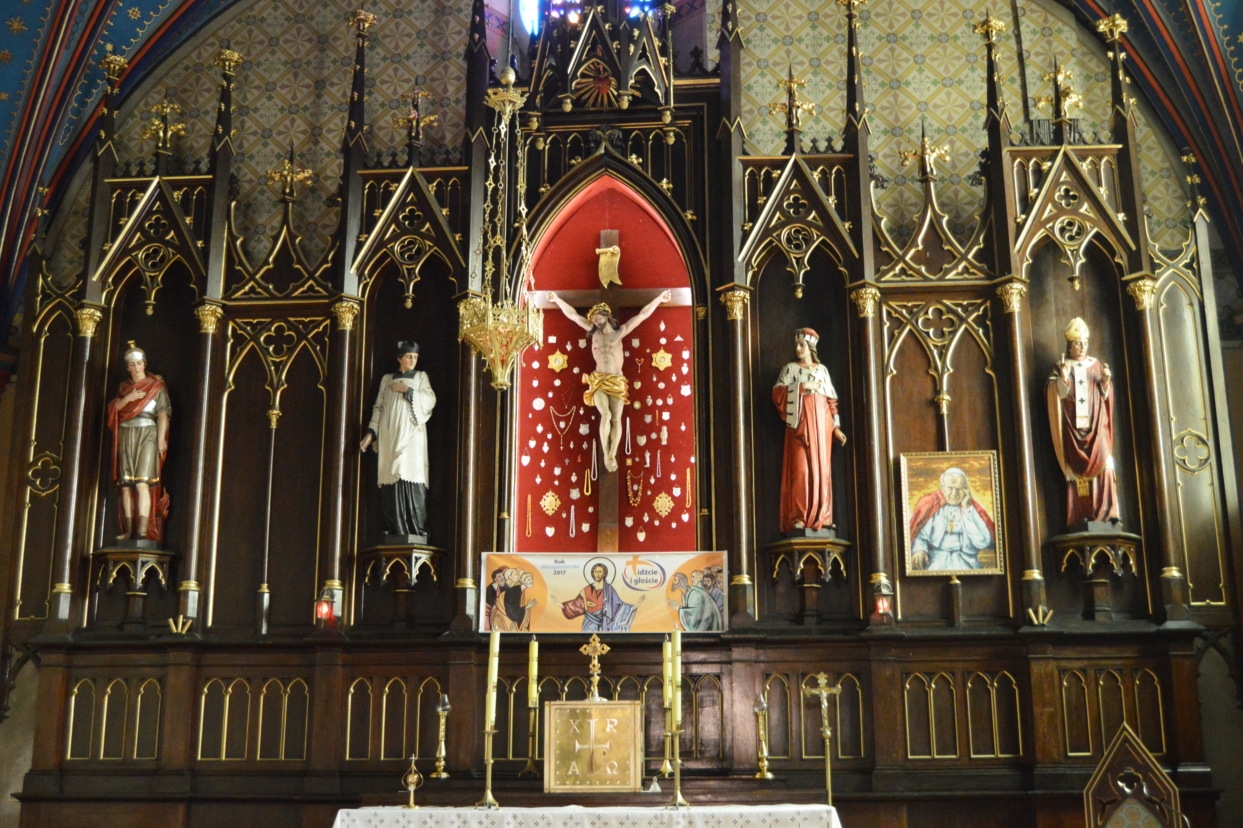 ołtarz główny w kościele Podwyższenia Krzyża Świętego w Kole